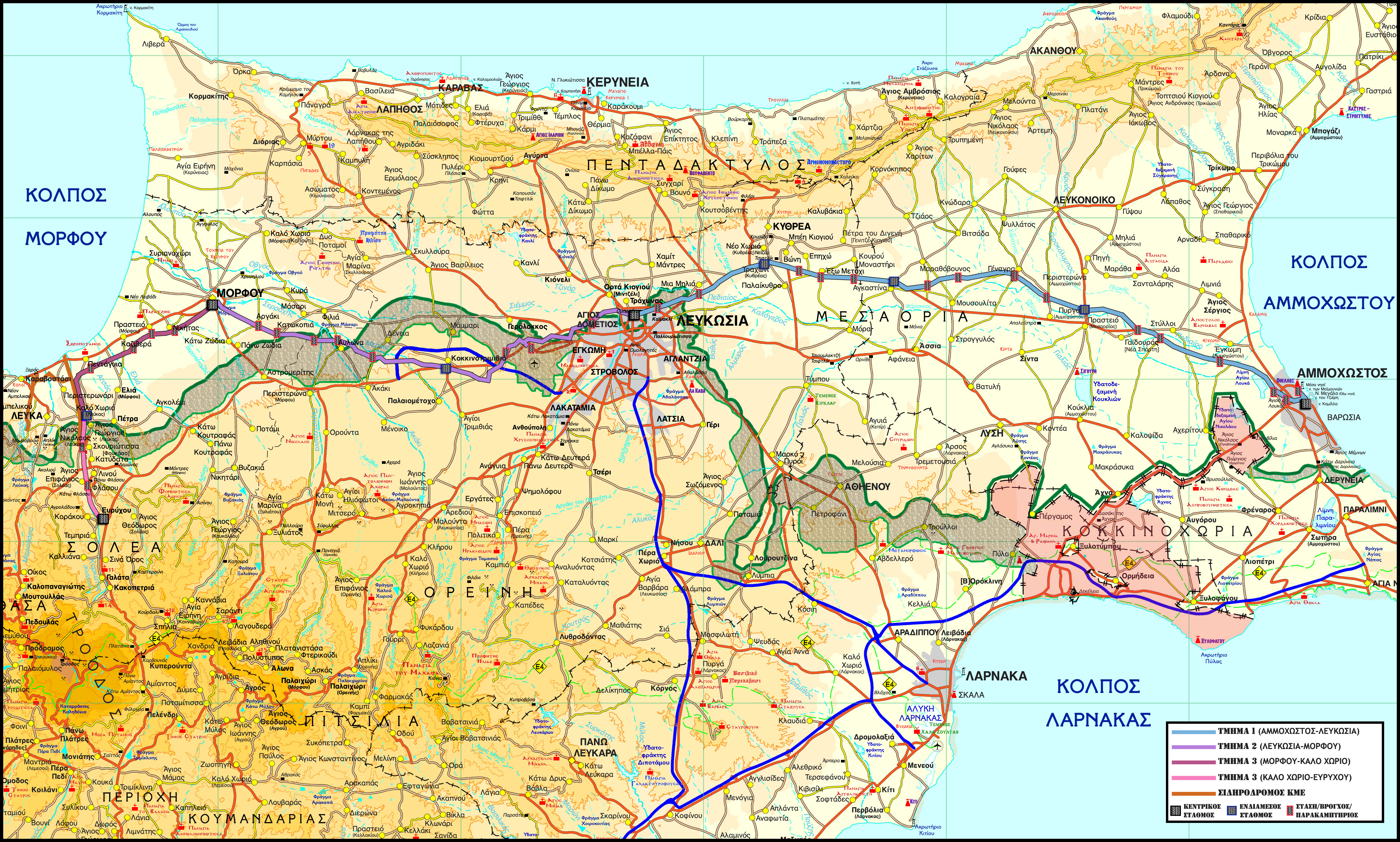 Χάρτης των διαδρομών του ΚΚΣ. UTM projection, WGS84 datum Scales: Topography: 1:175.000